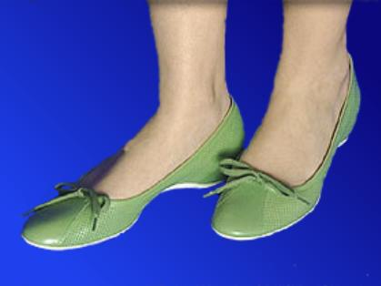 Green Ballerina Shoes